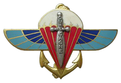 Insigne régimentaire du 2° RPIMa